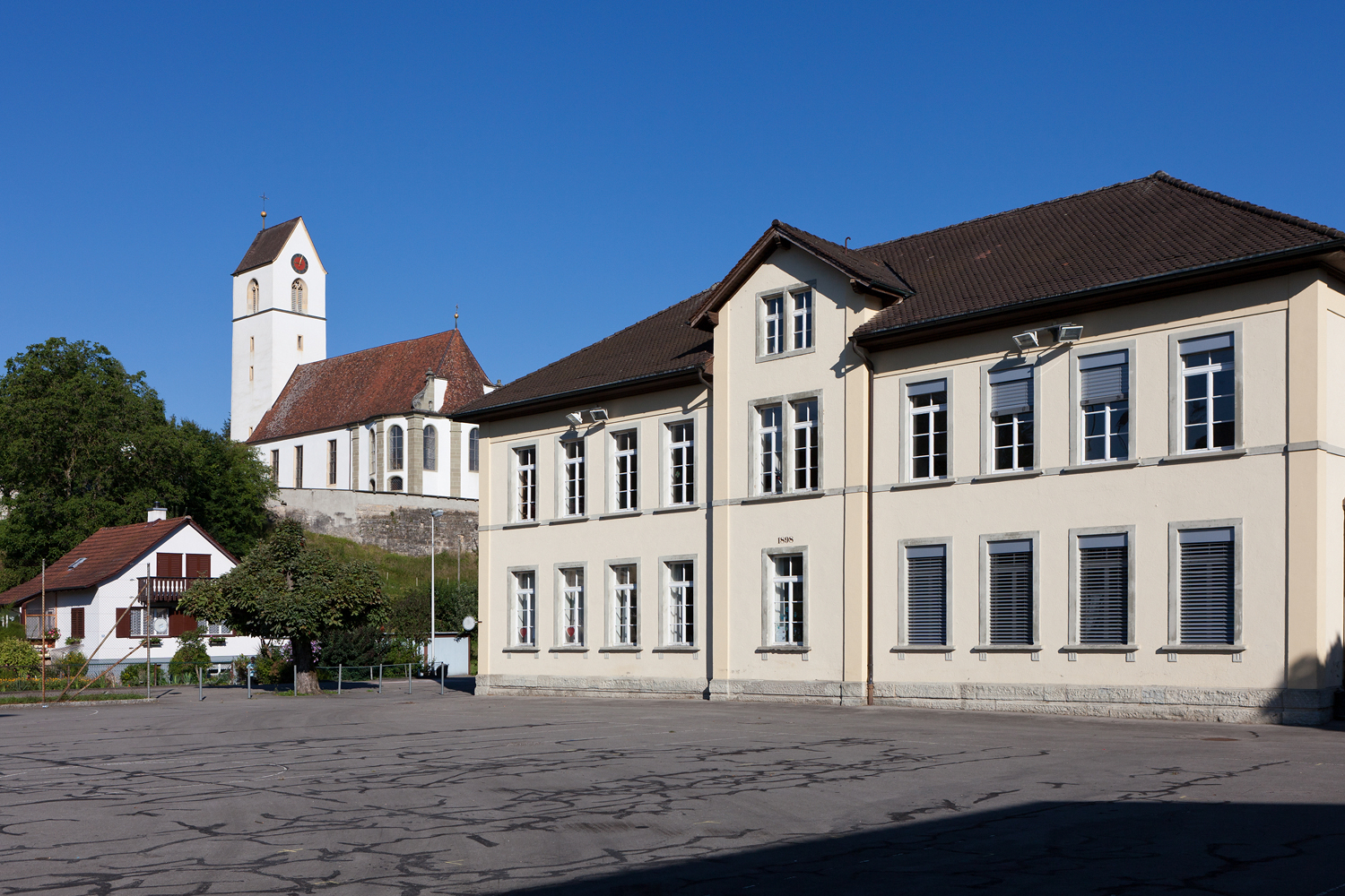 Kirche St.Niklaus und das alte Schulhaus in Herznach (AG)